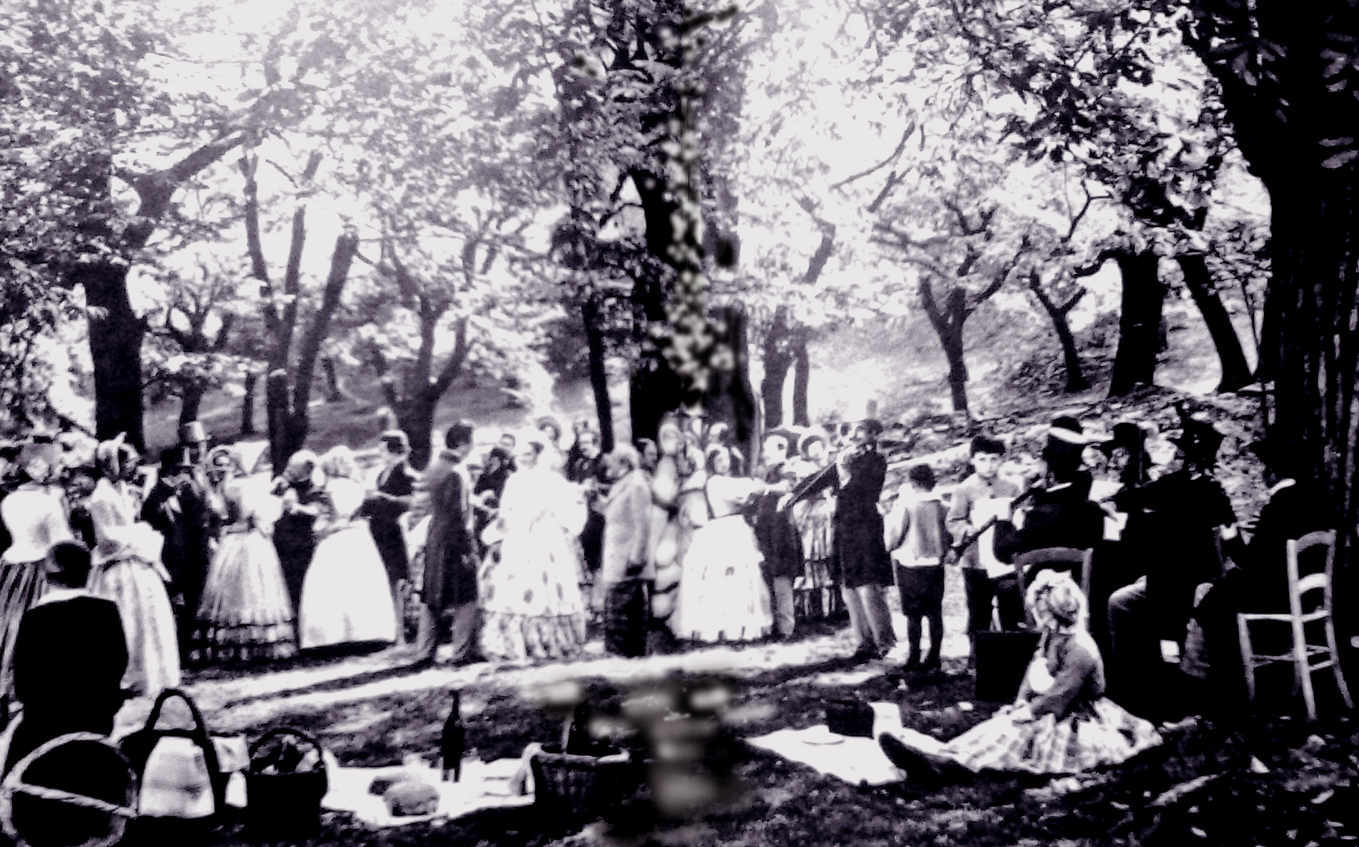 Scena della merenda nel bosco ("Piccolo mondo antico" - Soldati, 1941)